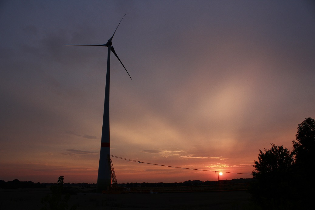 Windenergieanlage Enercon E-82 in Berlin-Stadtrandsiedlung Malchow an der B2. unbearbeitete Nachtaufnahme.